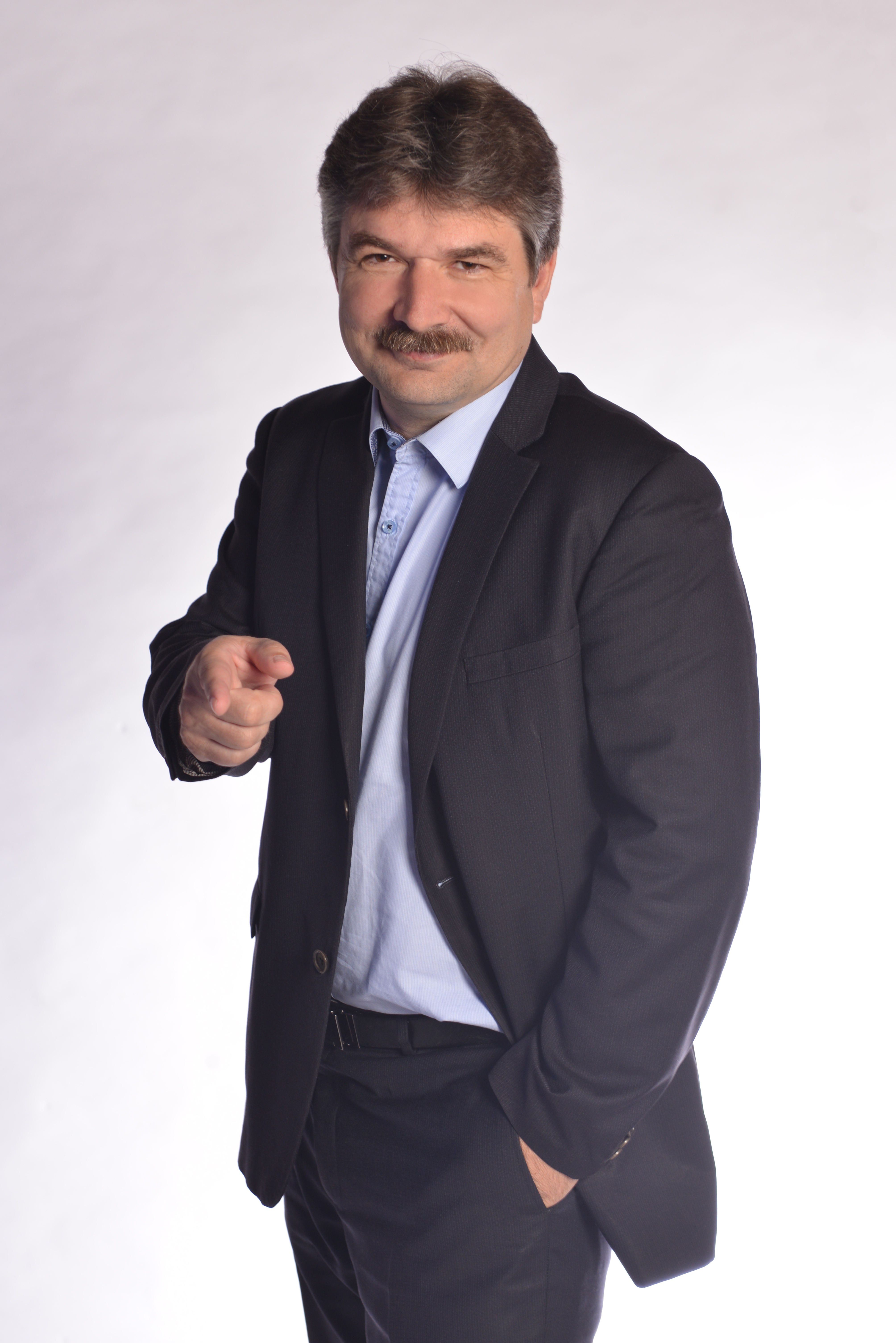 Jiří Němec (KDU-ČSL)